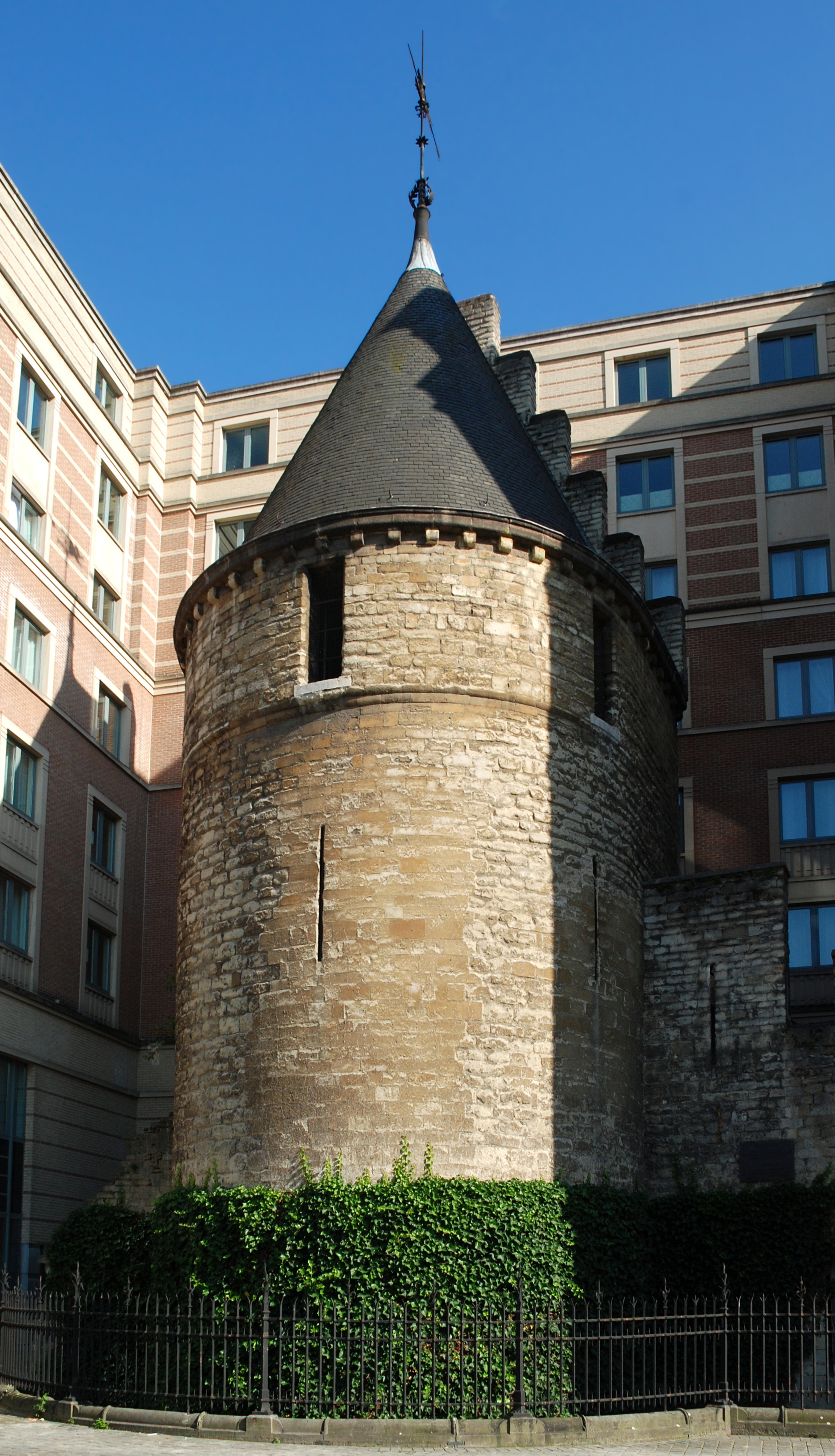 Belgique - Bruxelles - Tour Noire